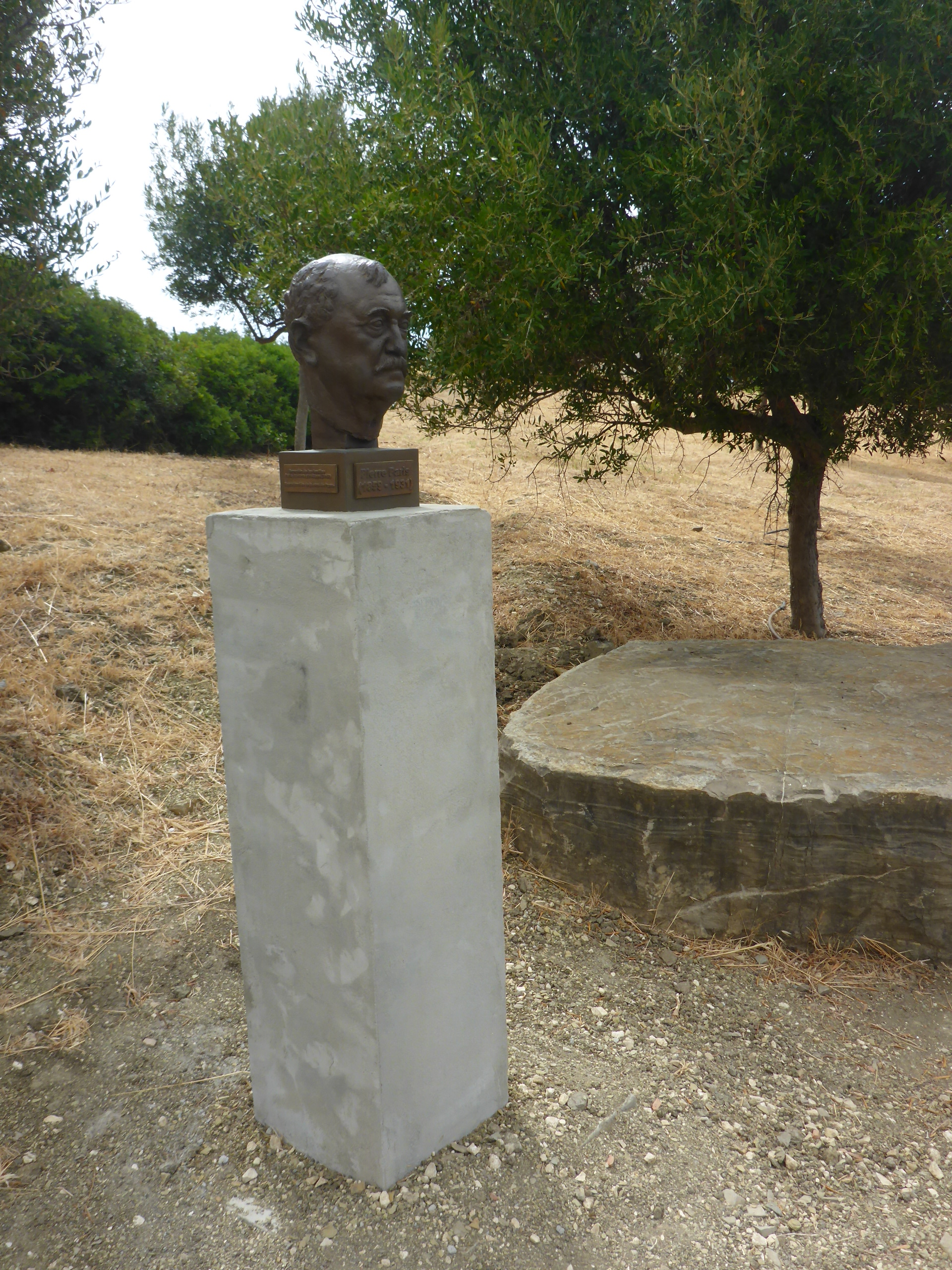 Monumento a Pierre Paris en Baelo Claudia (España)